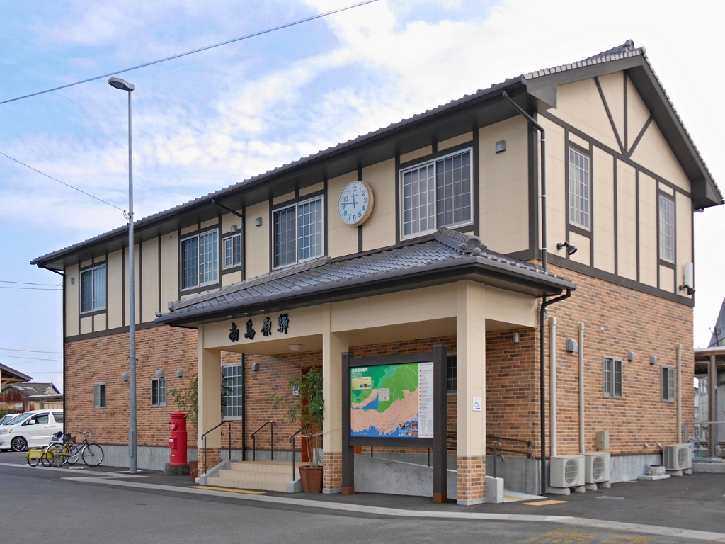 島原鉄道の南島原駅駅舎（長崎県島原市）。駅前より撮影。